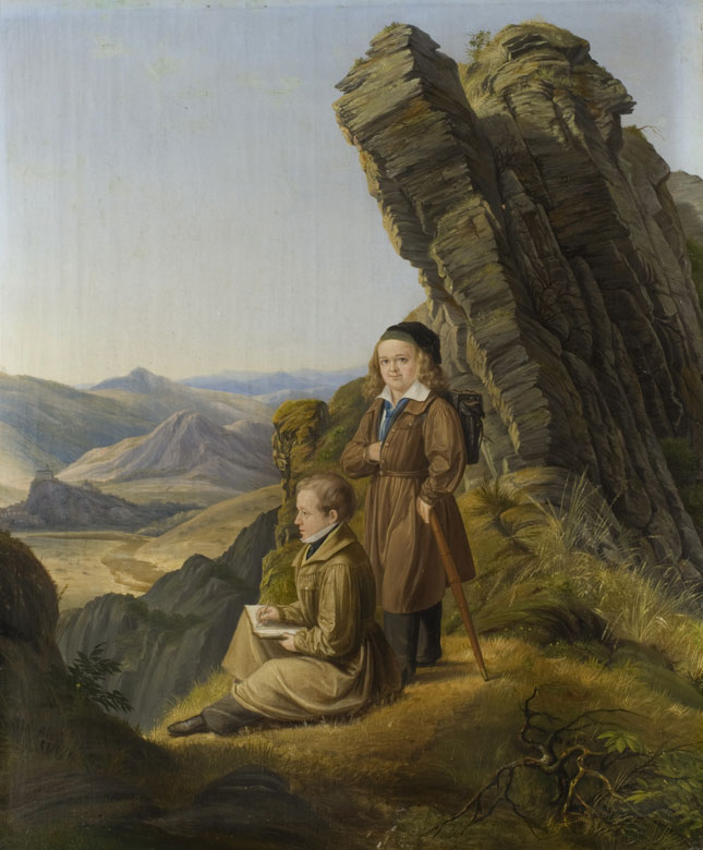 Die beiden Maler auf einer Anhöhe mit rechts im Hintergrund hochragendem, kahlen Felsen dargestellt. Einer der beiden sitzend mit Skizzenbuch, der andere auf einen Stock gestützt stehend, den Blick aus dem Bild dem Betrachter zugewandt, die rechte Hand in die Öffnung des Gehrocks gesteckt und mit ledernem Ranzen. Die beiden Maler sind in der typischen Reisekleidung der Romantiker dargestellt, der stehende mit langem, lockigen Haar in Art der Nazarener und mit entsprechender Barett-Kapuze, der am Boden sitzende mit dem damals moderneren, kürzeren Haar der Biedermeierzeit.